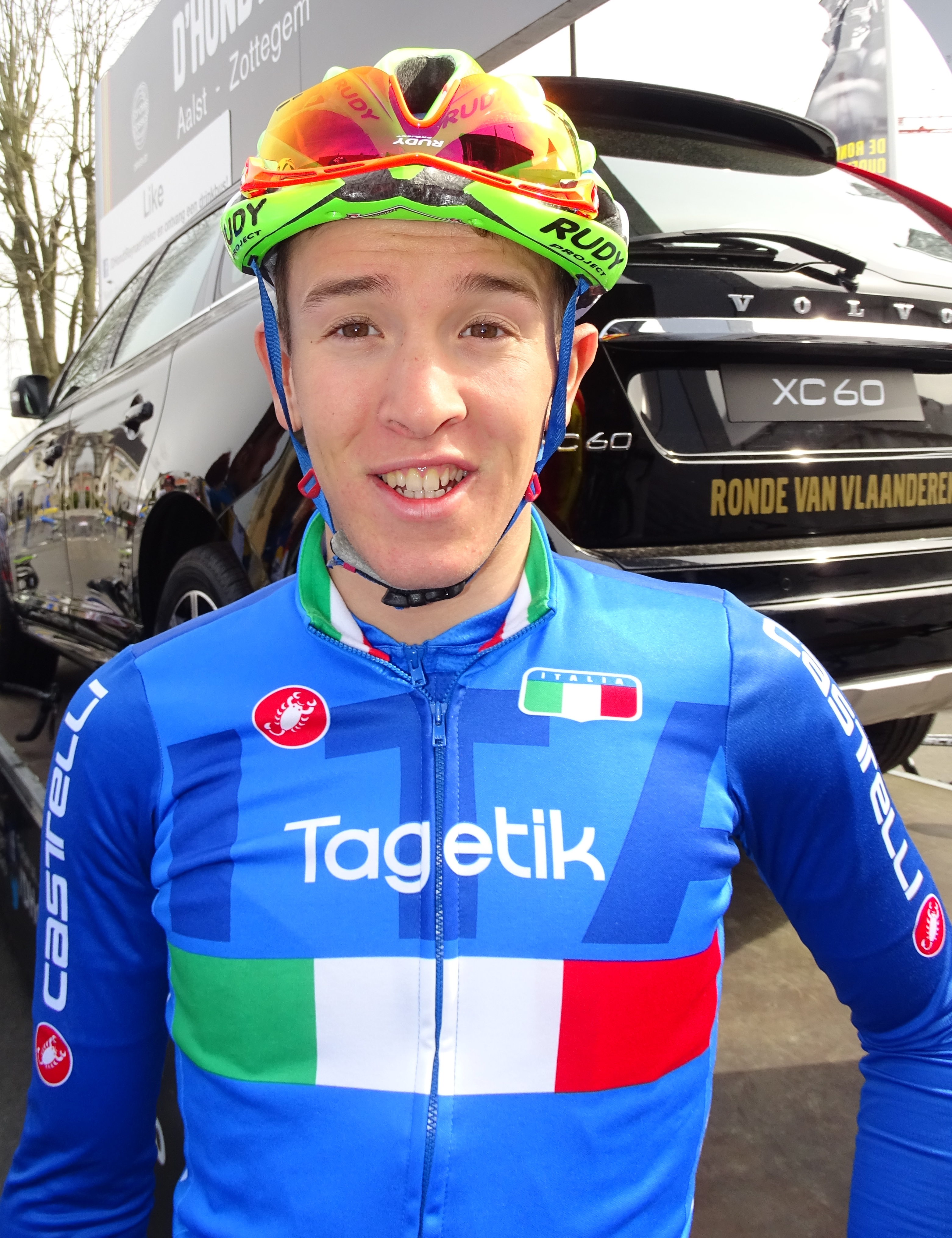 Reportage réalisé le samedi 9 avril à l'occasion du départ et de l'arrivée du Tour des Flandres espoirs 2016 à Audenarde, Belgique.